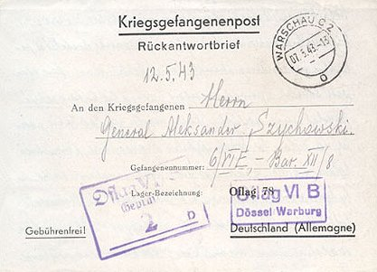 Załącznik desygnacyjny do listu adresowanego do przebywającego w oflagu gen. Aleksandra Szychowskiego